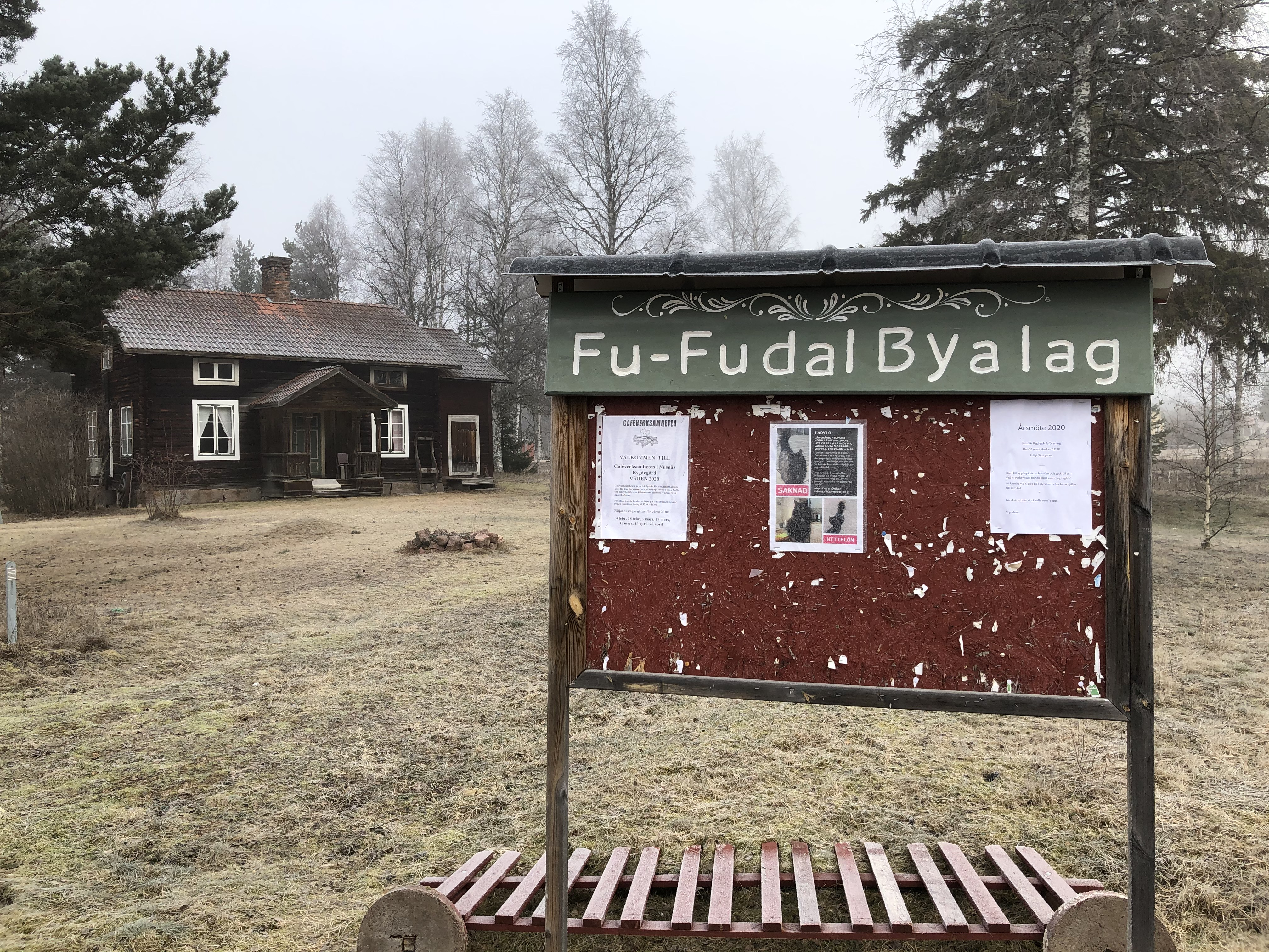 Anslagstavla i Fu, by utanför Mora.